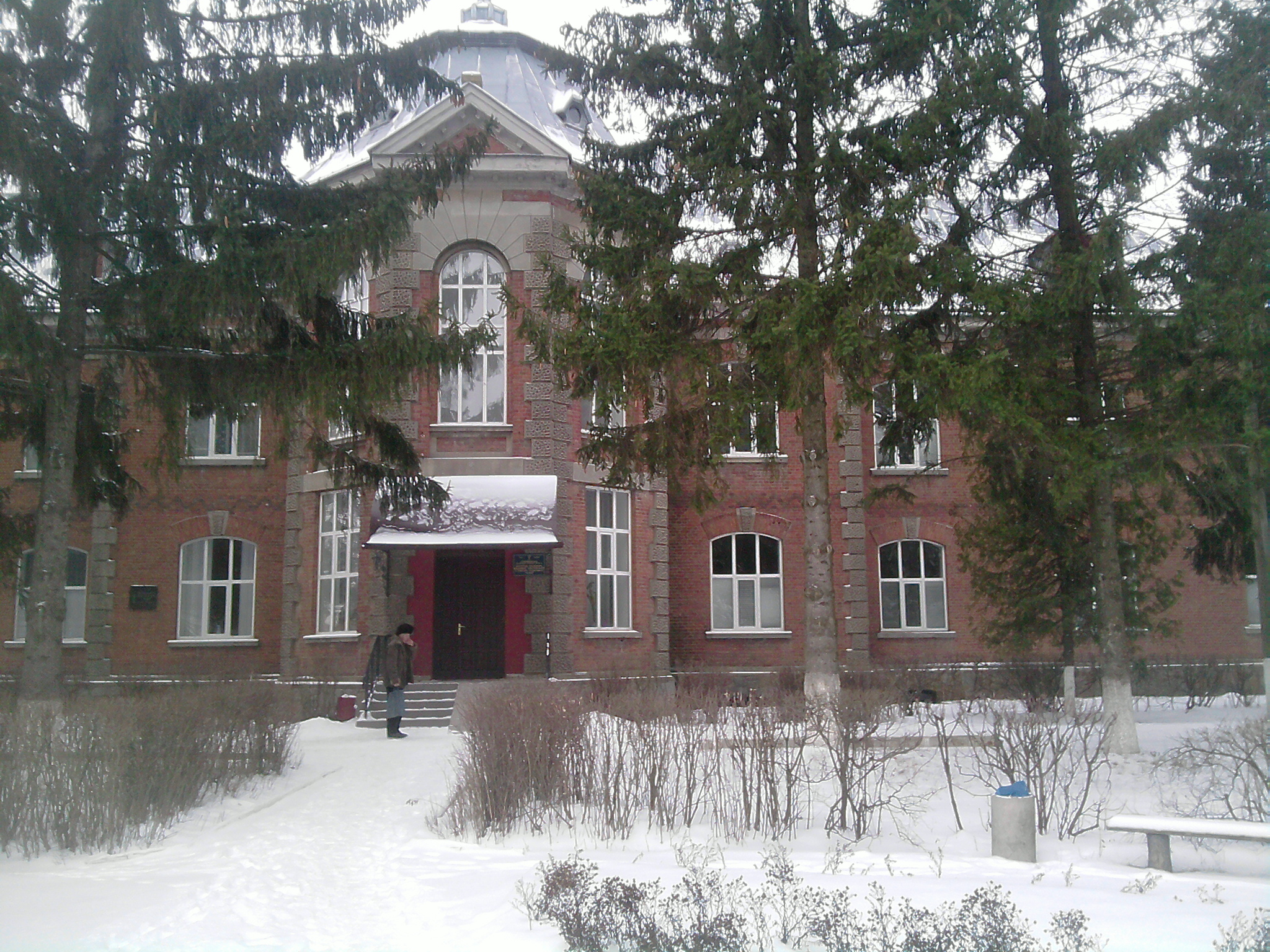 Будівництво лікарні започаткував 1911 року граф Браніцький, а завершили - більшовики 1923 року